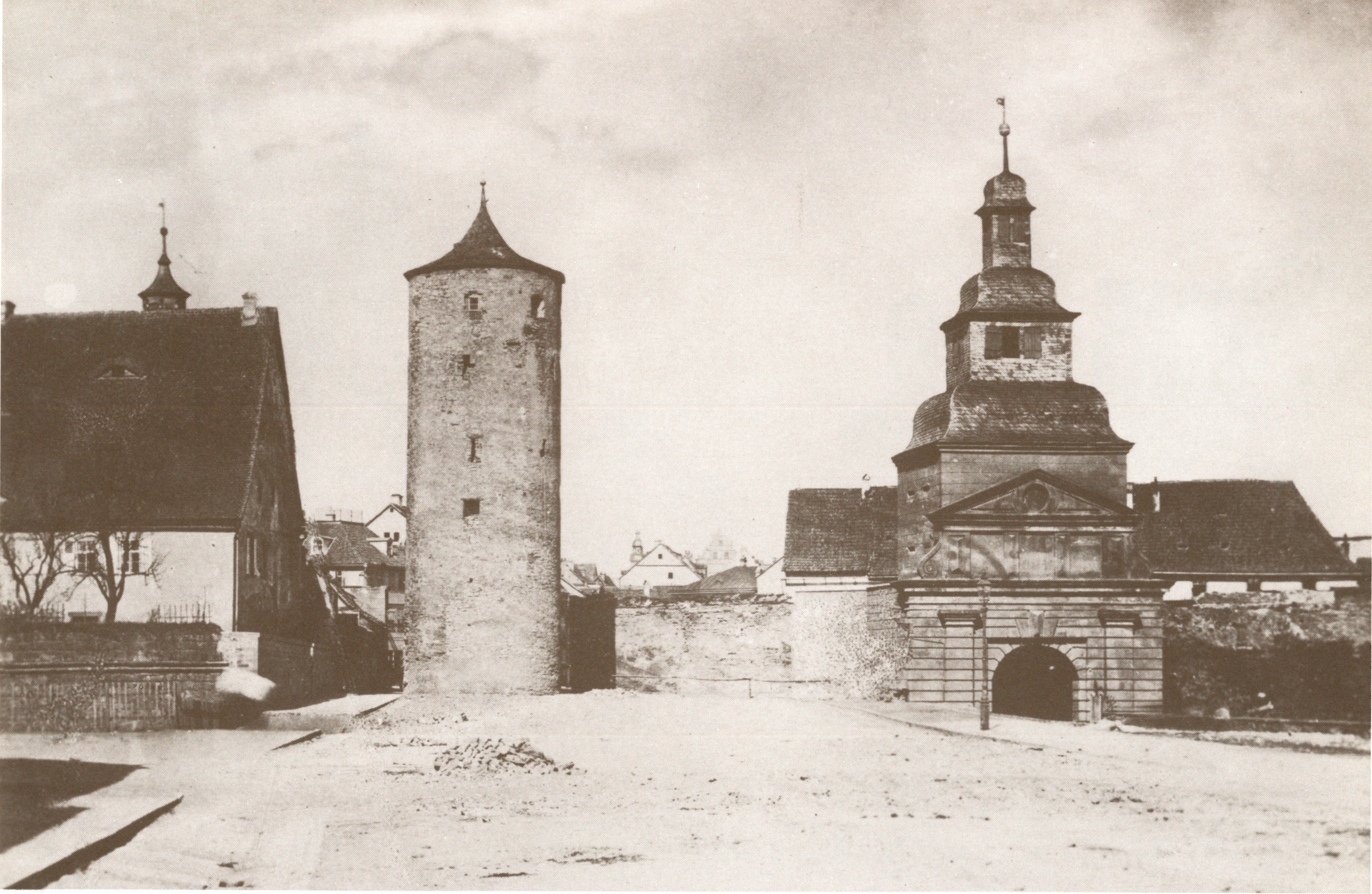 Schweinfurt Fotografie vor 1896: äußeres Spitaltor (rechts), Wachturm von 1555 (mittig links), Spital (links)